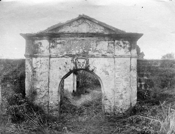 Repronegatief. De hoofdpoort van de vestingwerken van de V.O.C. op Boeroe, opgericht in 1748